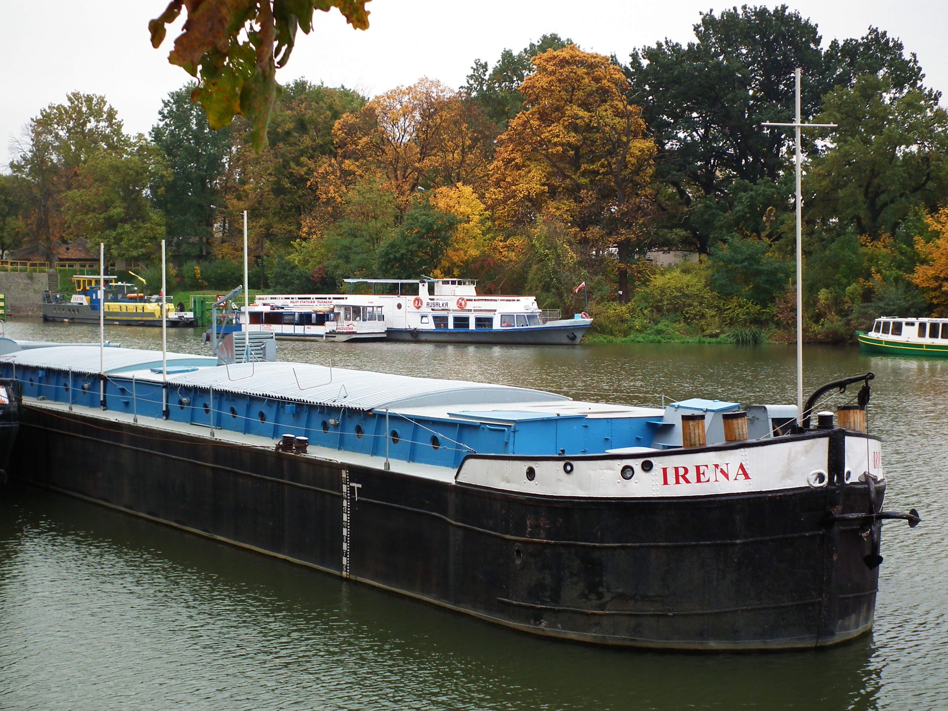 Barka Irena na Starej Odrze we Wrocławiu.